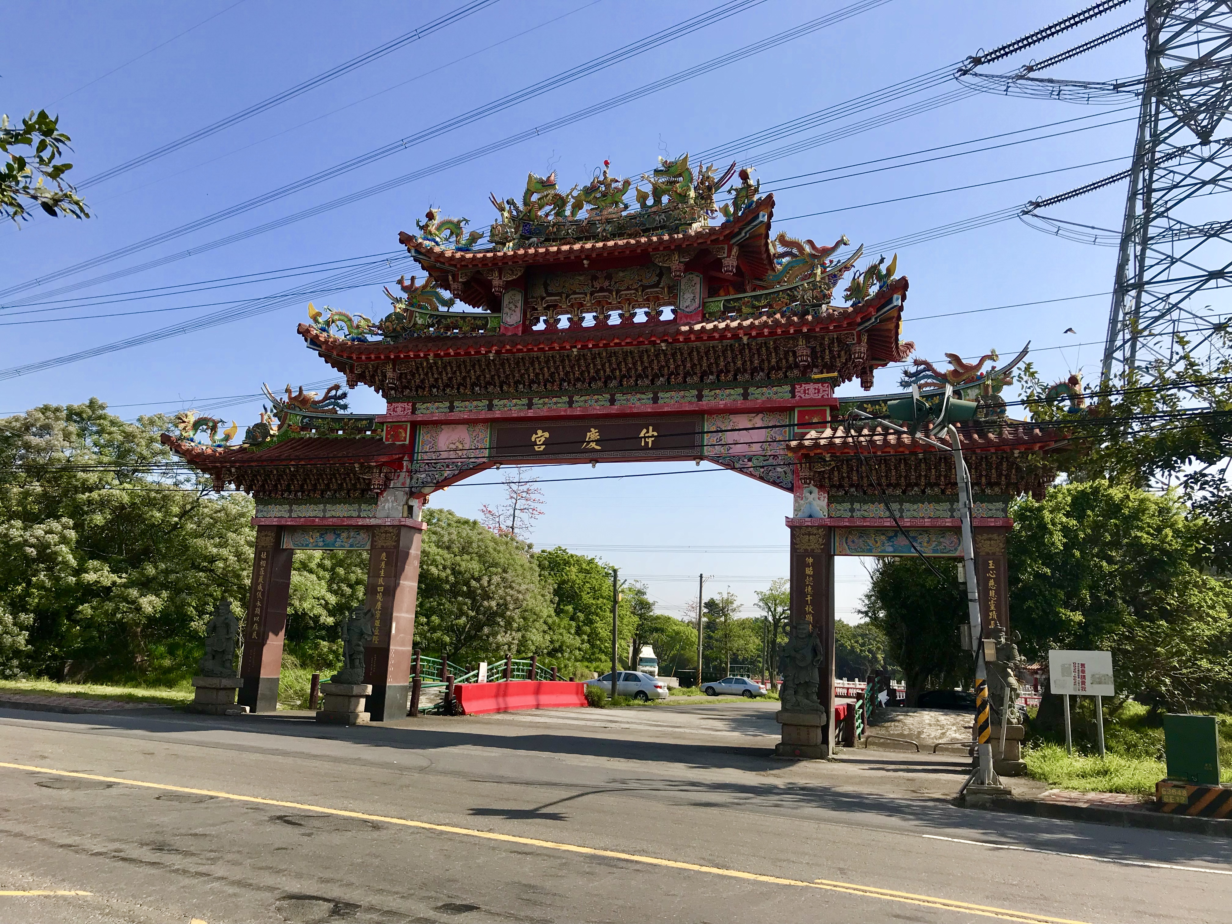 伸慶宮牌樓